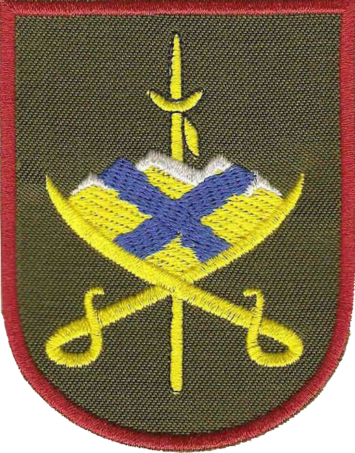 Нарукавный знак 23-й ОМСБр (Кряж)